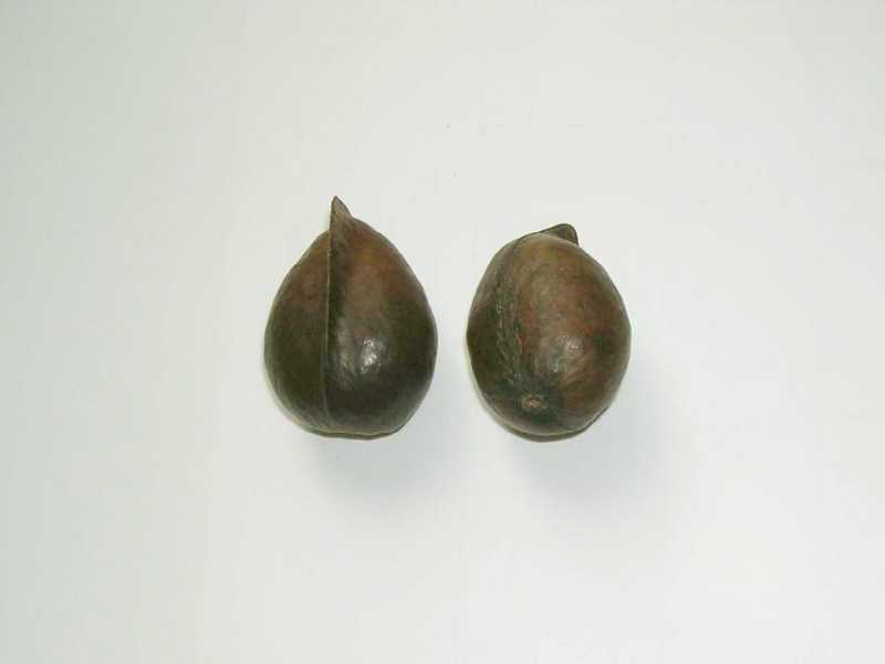 銀葉樹的果實